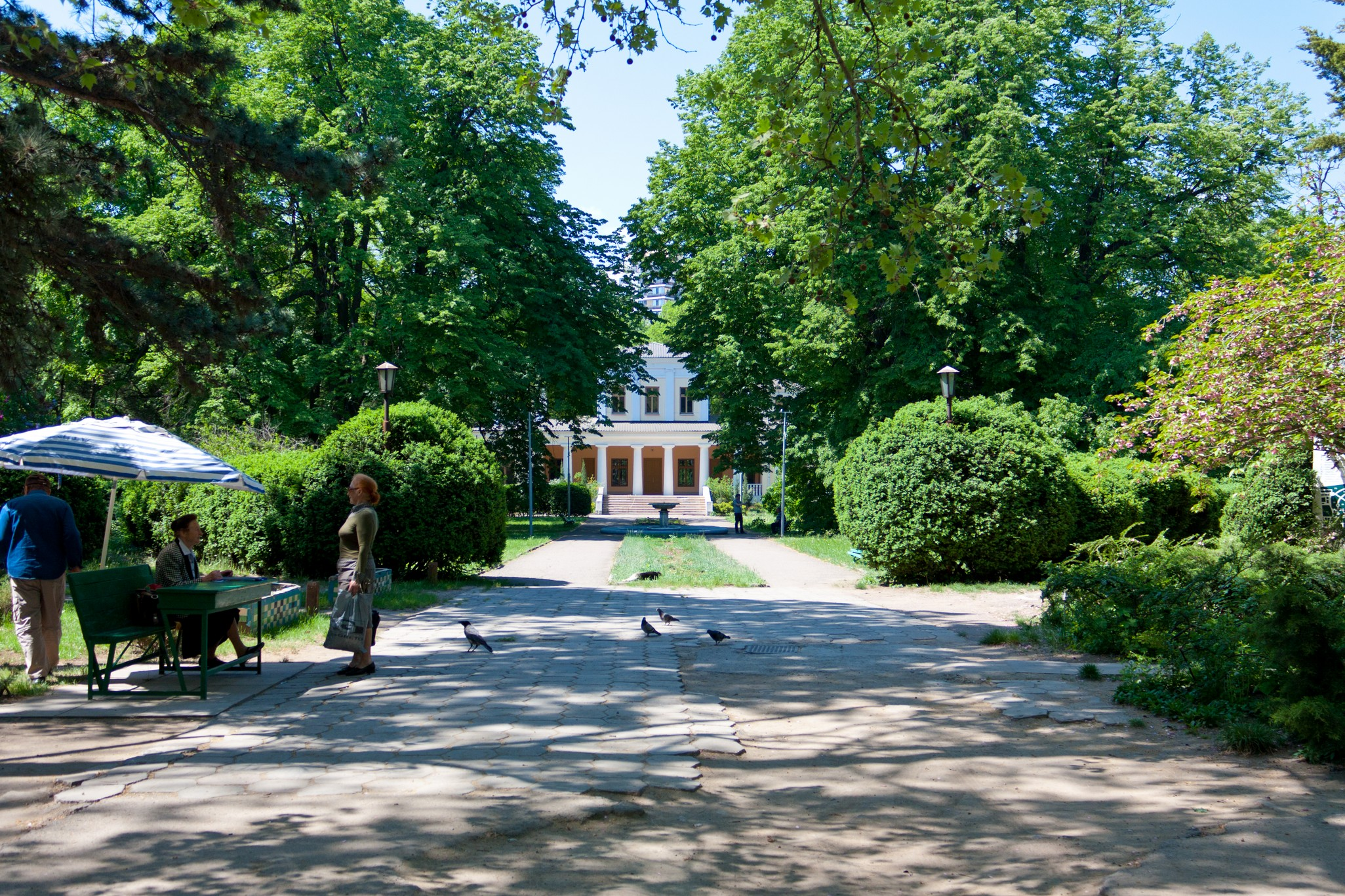 Ботанічний сад ОНУ